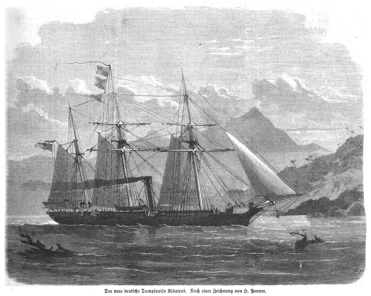 Das Kanonenboot SMS Albatros (oder Albatross) der deutschen Kaiserlichen Marine, gebaut 1871.